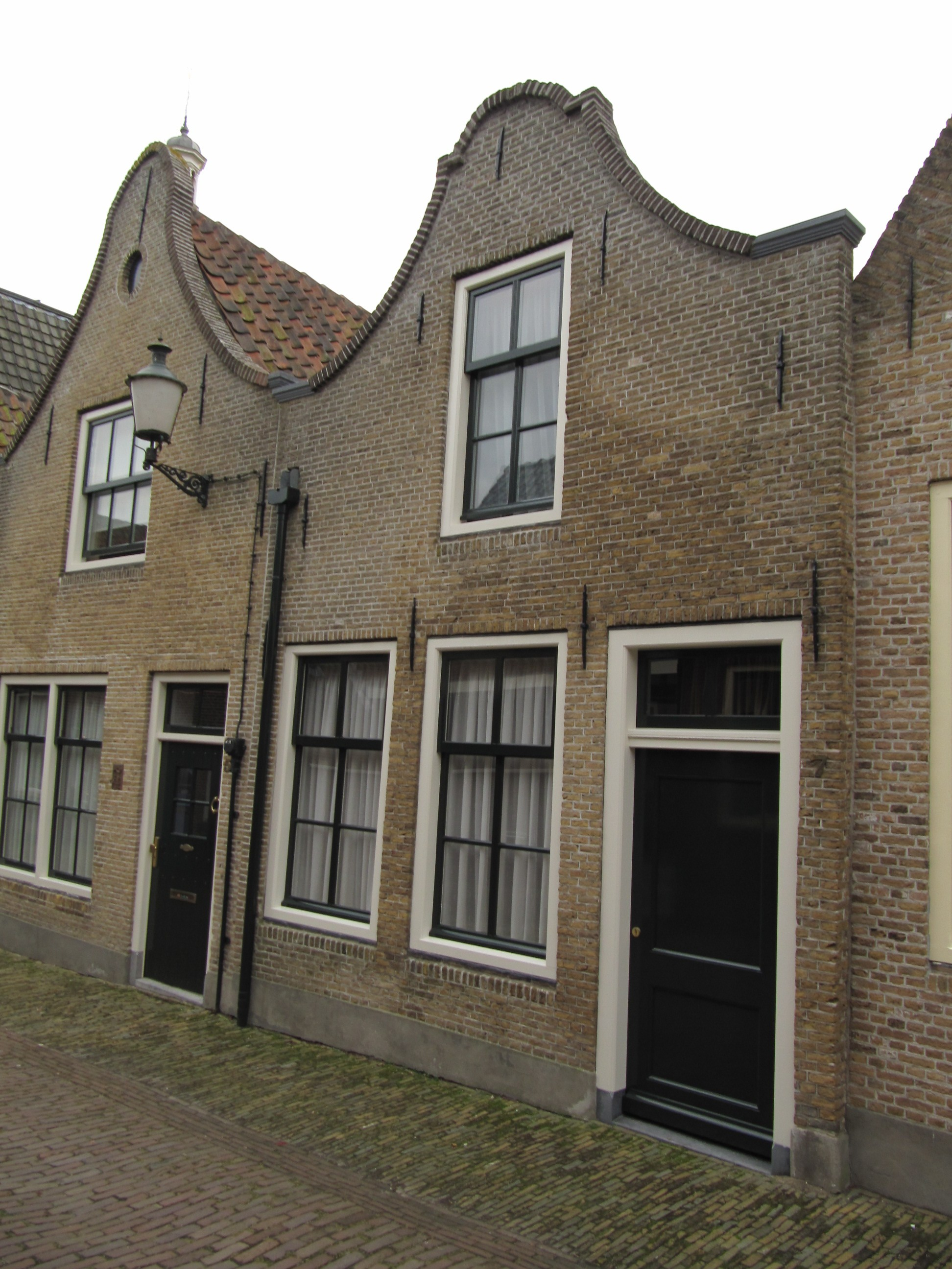 RM19946 Haastrecht - Kerkstraat 7.jpg